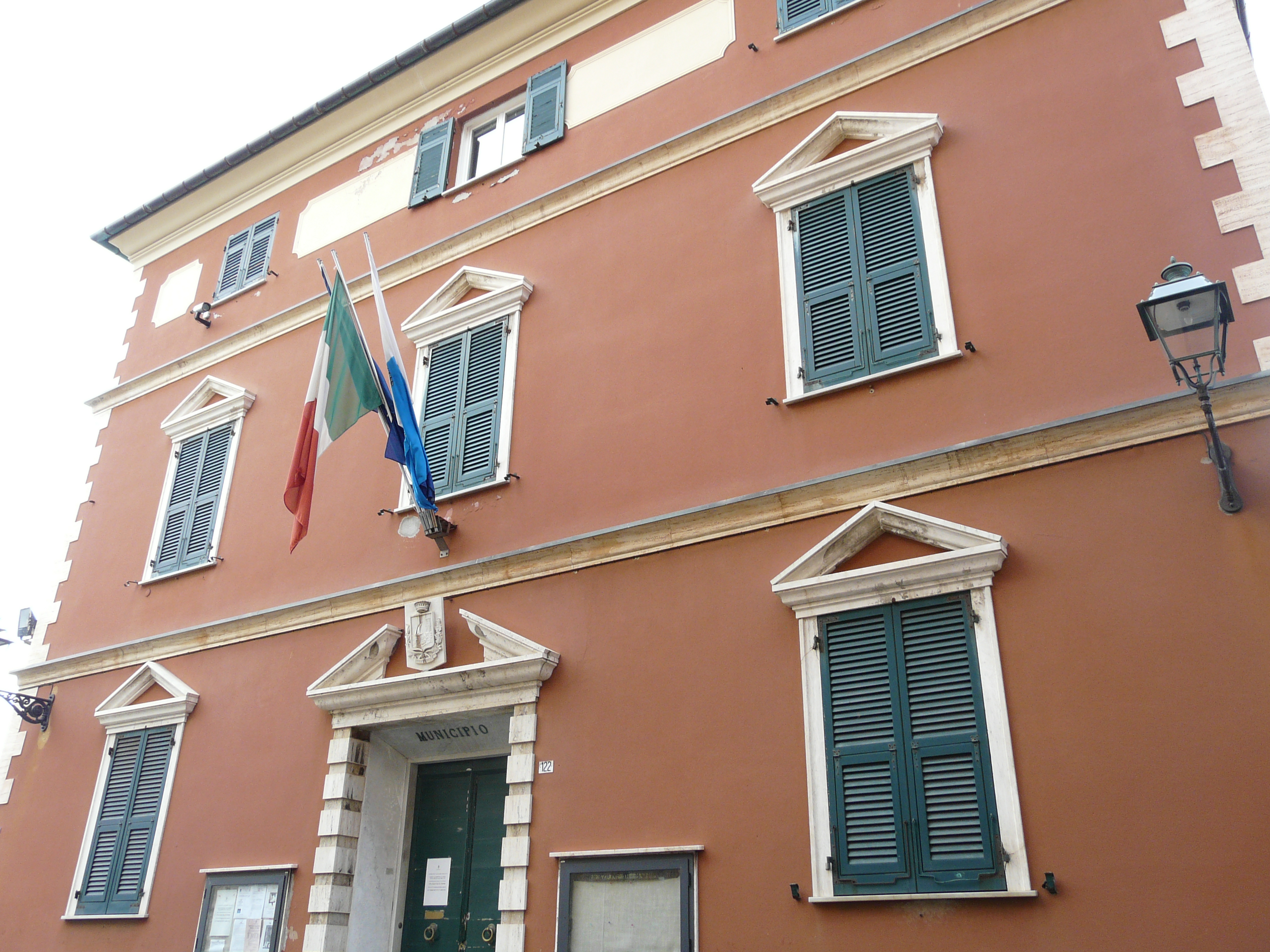 Municipio, Bogliasco, Liguria, Italia